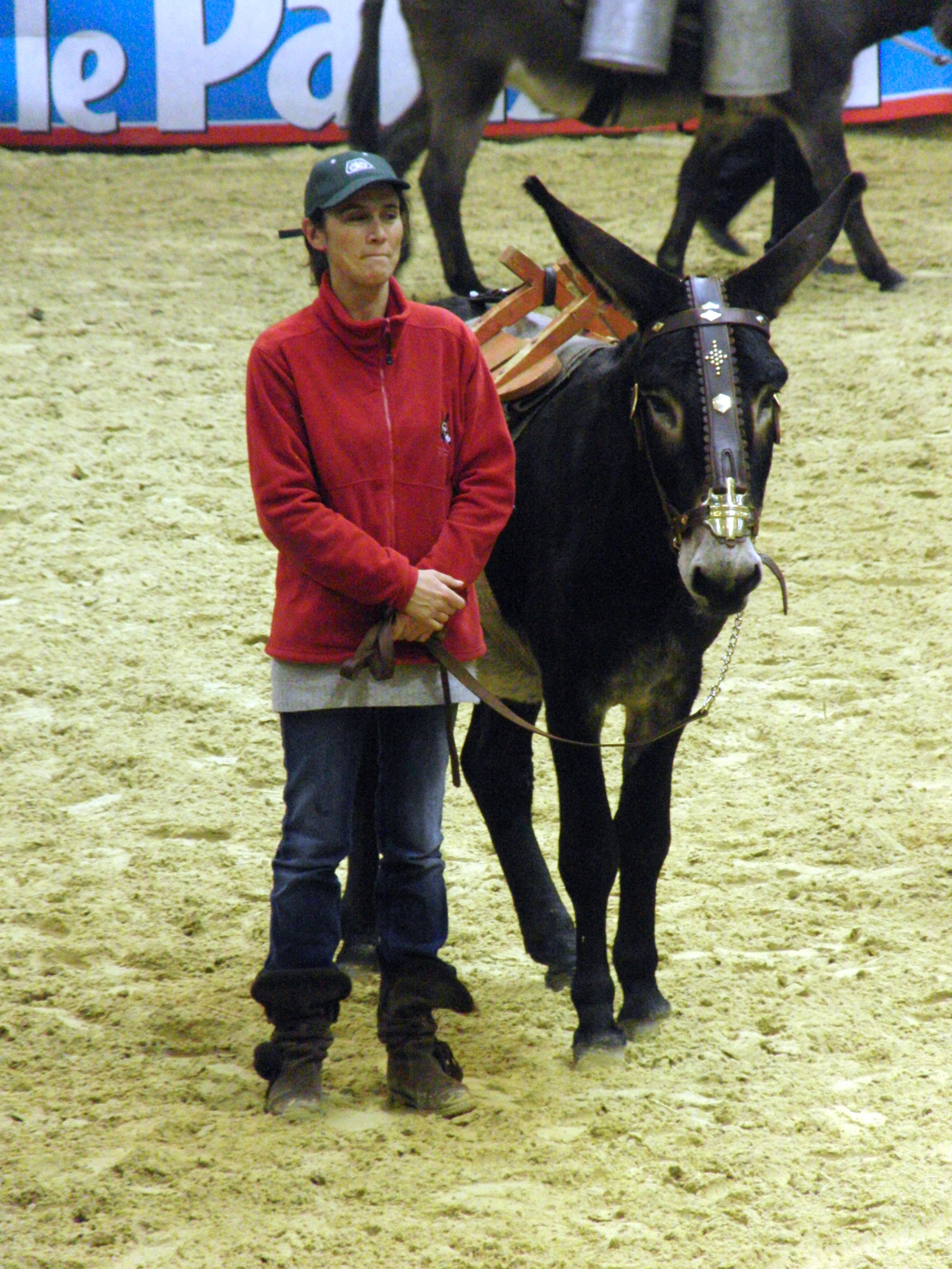 Présentation d'un âne des Pyrénées de type gascon - Salon international de l'agriculture 2013, Paris, France